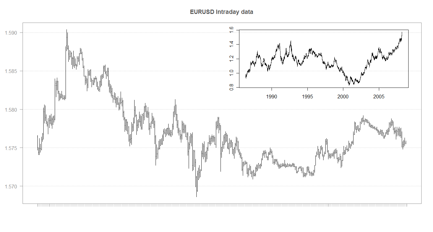 EUR - USD FX , intradday data